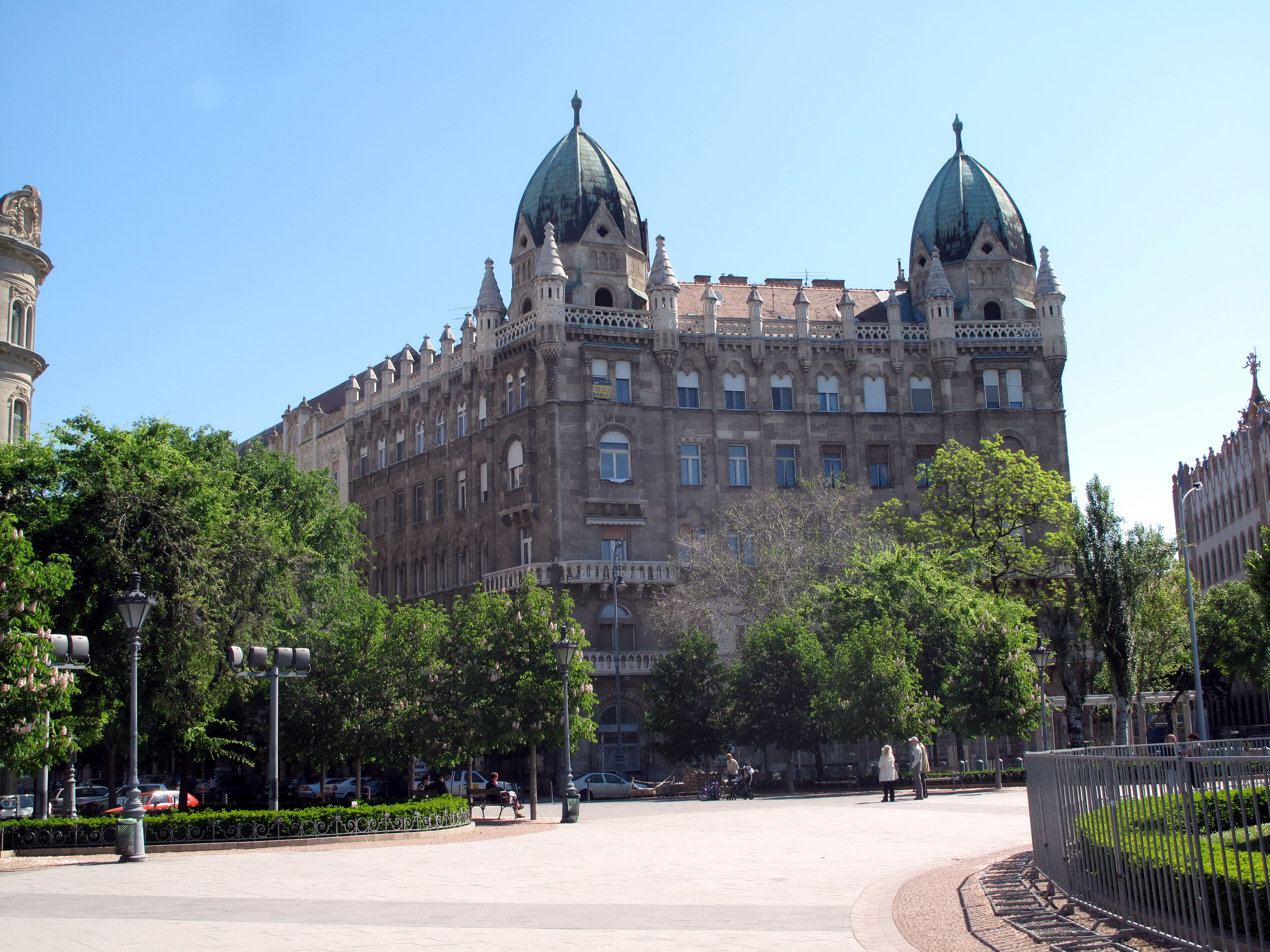 Budapešť Perczel Mór u. 2, Szabadság tér 13, Aulich u. 1-3